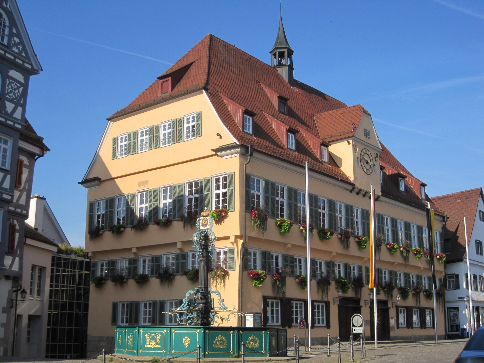 Das alte Rathaus in Nürtingen mit dem Marktbrunnen (von 1787/1791)